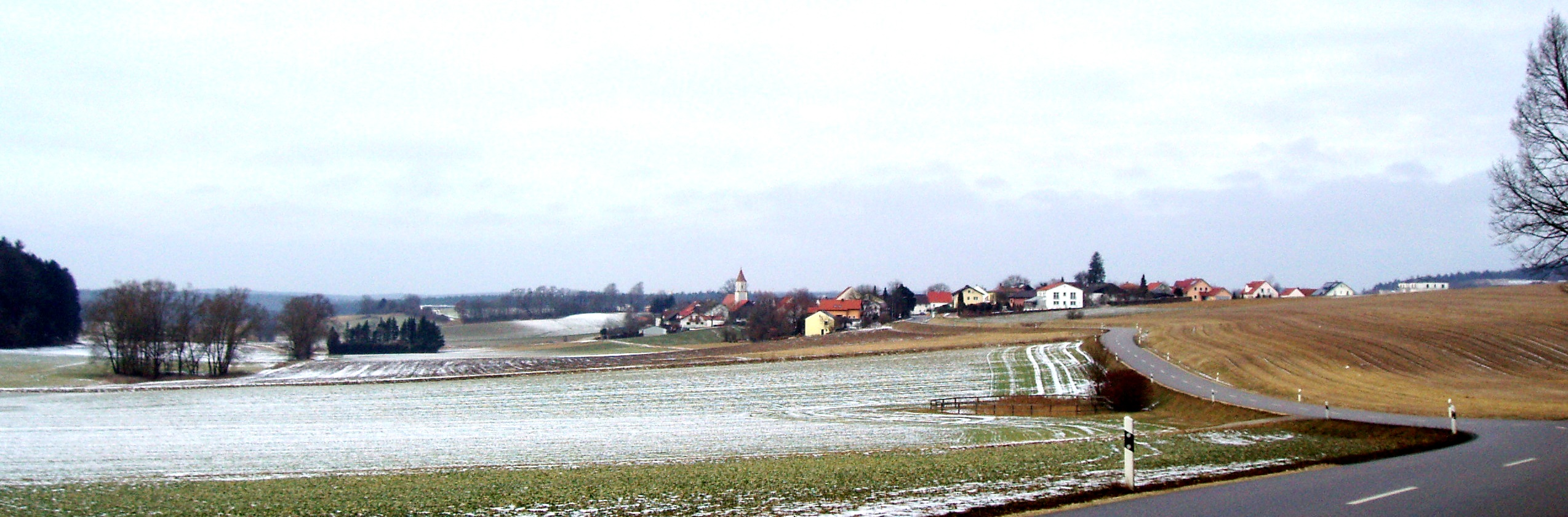 Schelldorf im Landkreis Eichstätt, Regierungsbezirk Oberbayern